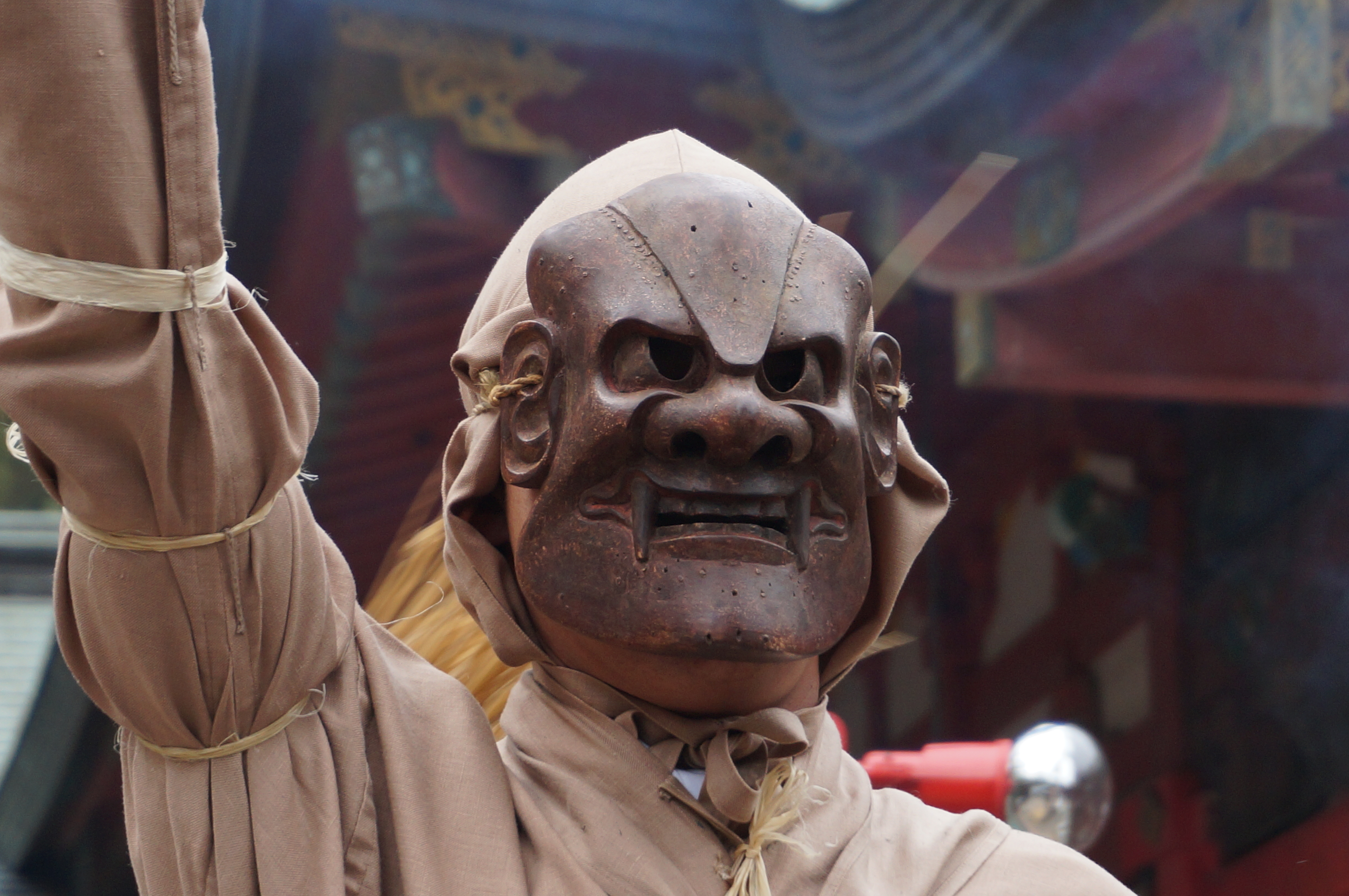 Hôsuke oni (le démon simplet)